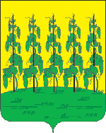 Герб Гороховца Владимирской области